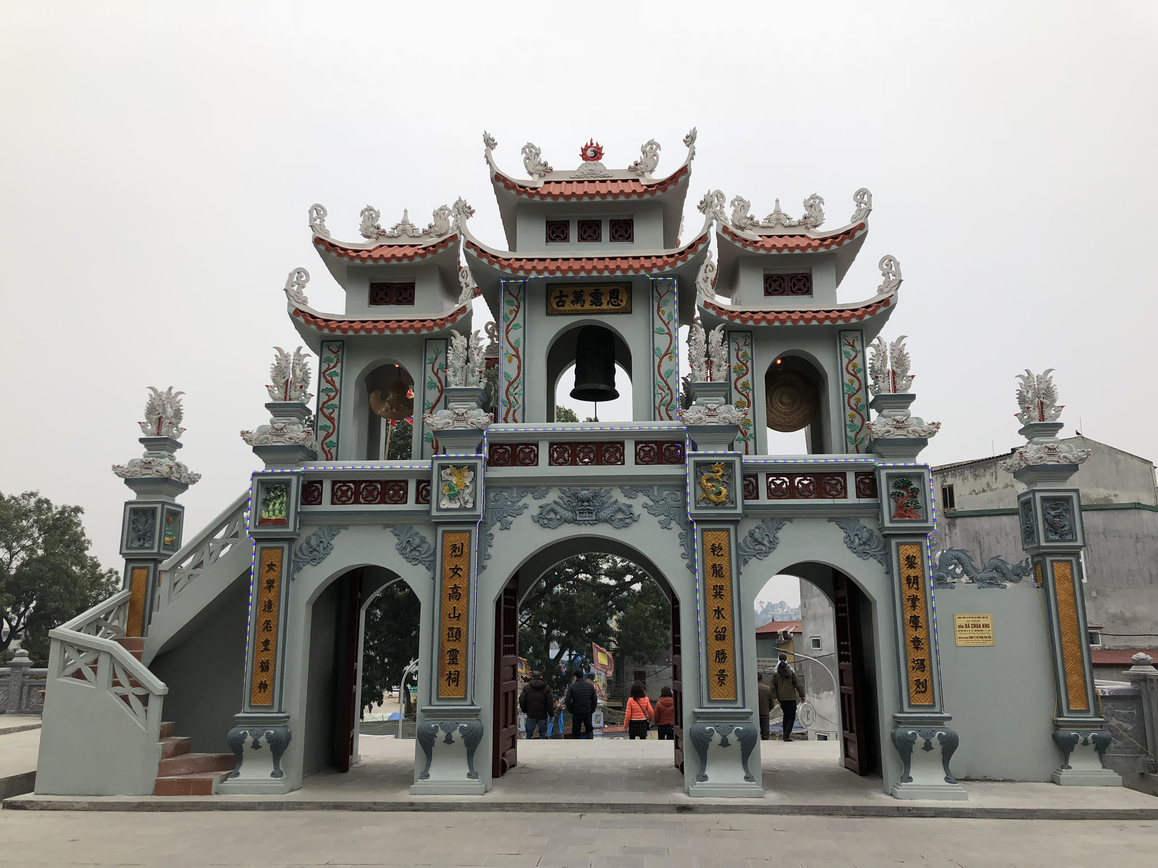 Tam quan đền bà chúa kho Bắc Ninh